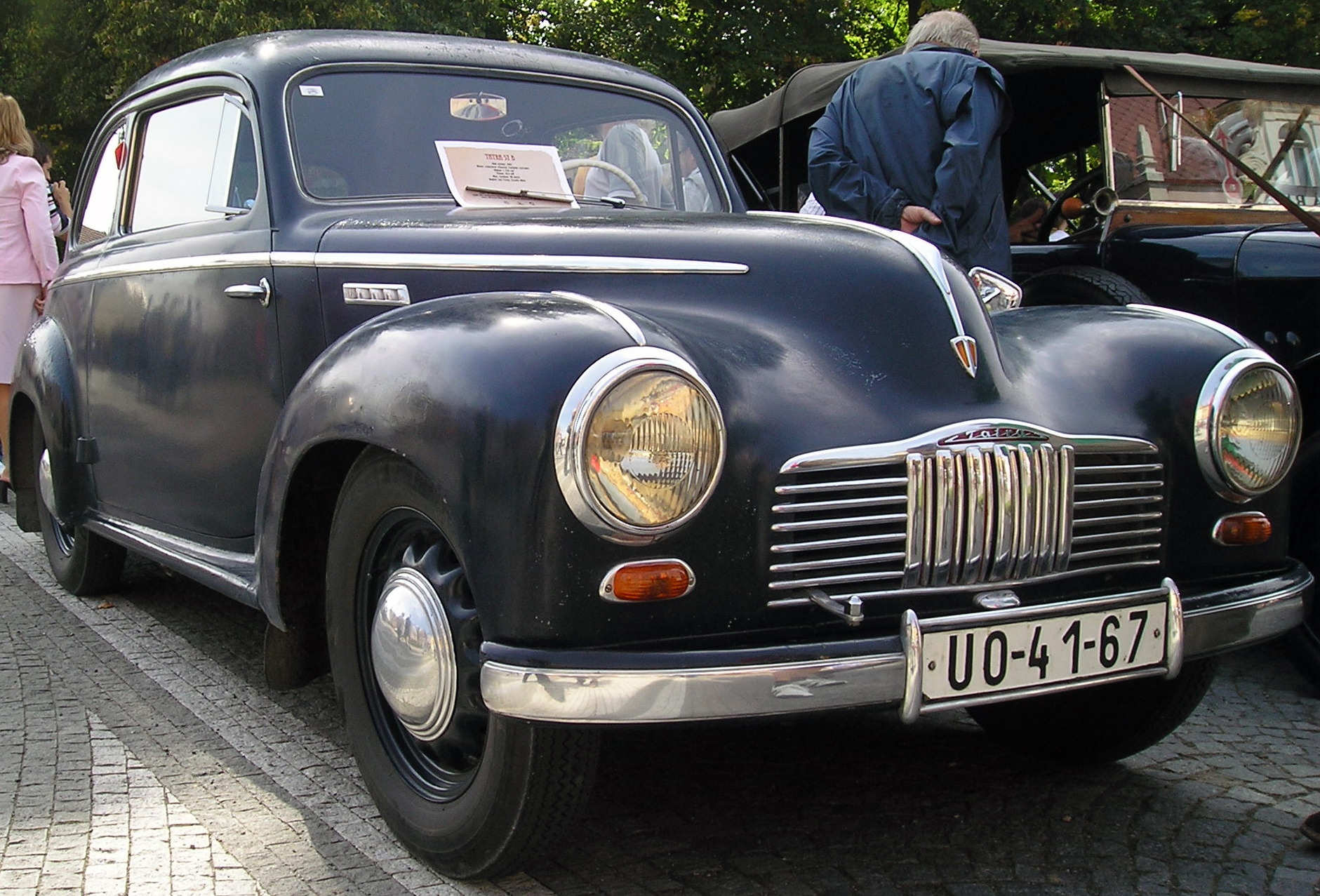 Česky: Tatra 57B - jediný vzniklý vůz, který byl vystaven v roce 1947 na autosalonu v Praze. Vznikl v karosárně Sodomka jako samostatná práce karosářského mistra Miroslava Říhy. Vůz se dochoval v původním stavu